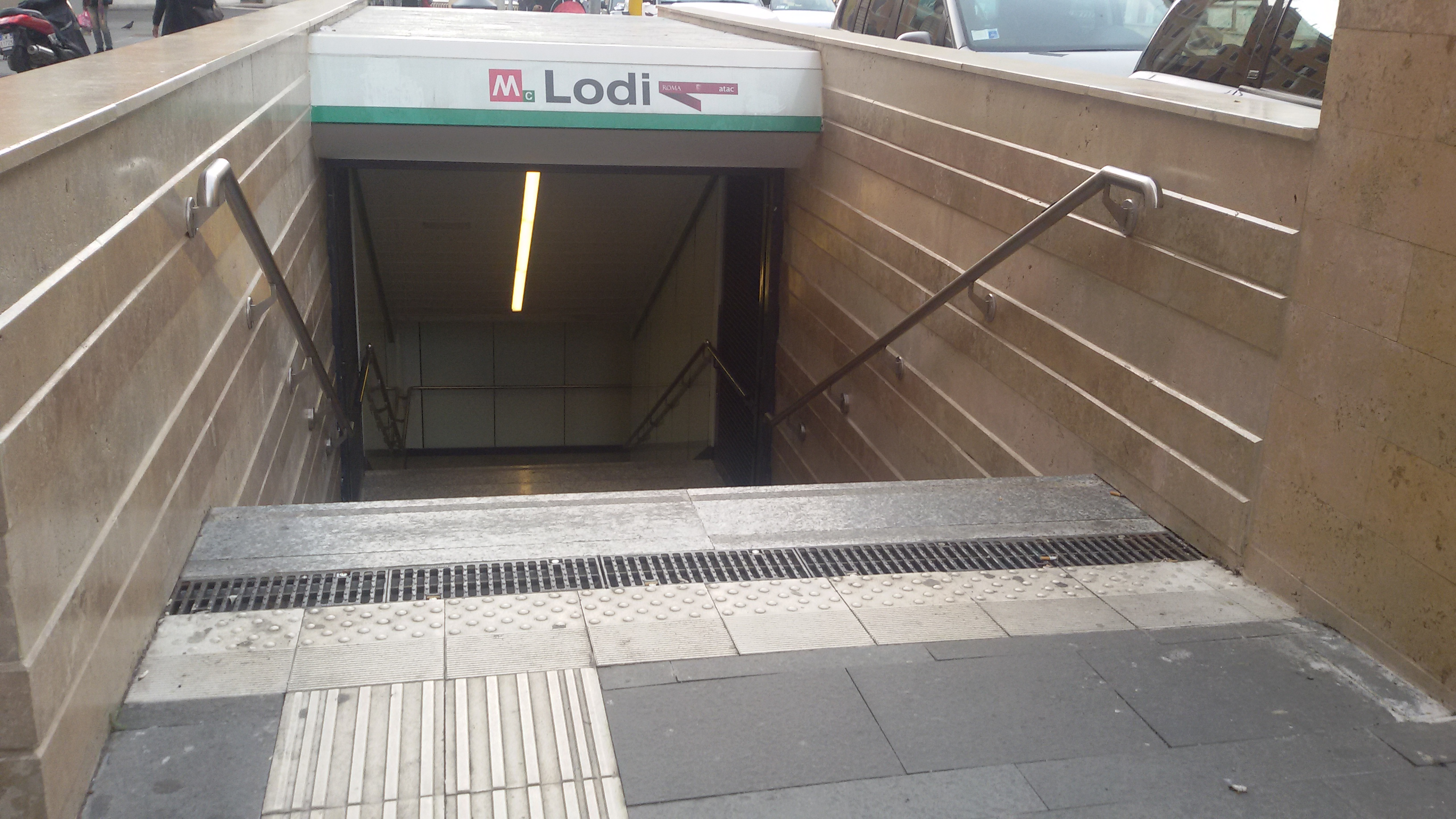 Ingresso alla stazione Lodi della metropolitana di Roma, linea C